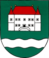 Boskovštejn, znak. V zeleném štítě nad sníženým stříbrným vlnitým břevnem stříbrná patrová budova zámku s valbovou střechou se dvěma makovicemi a s dvěma nárožními věžicemi se stanovými střechami s makovicemi, střechy červené, makovice zlaté. Zámek má oboustranné schodiště, v přízemí dveře a čtyři okna, v patře pět oken, věžice po okně v patře, dveře a okna černá.